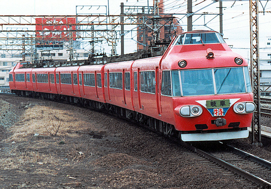 名古屋鉄道 7500系